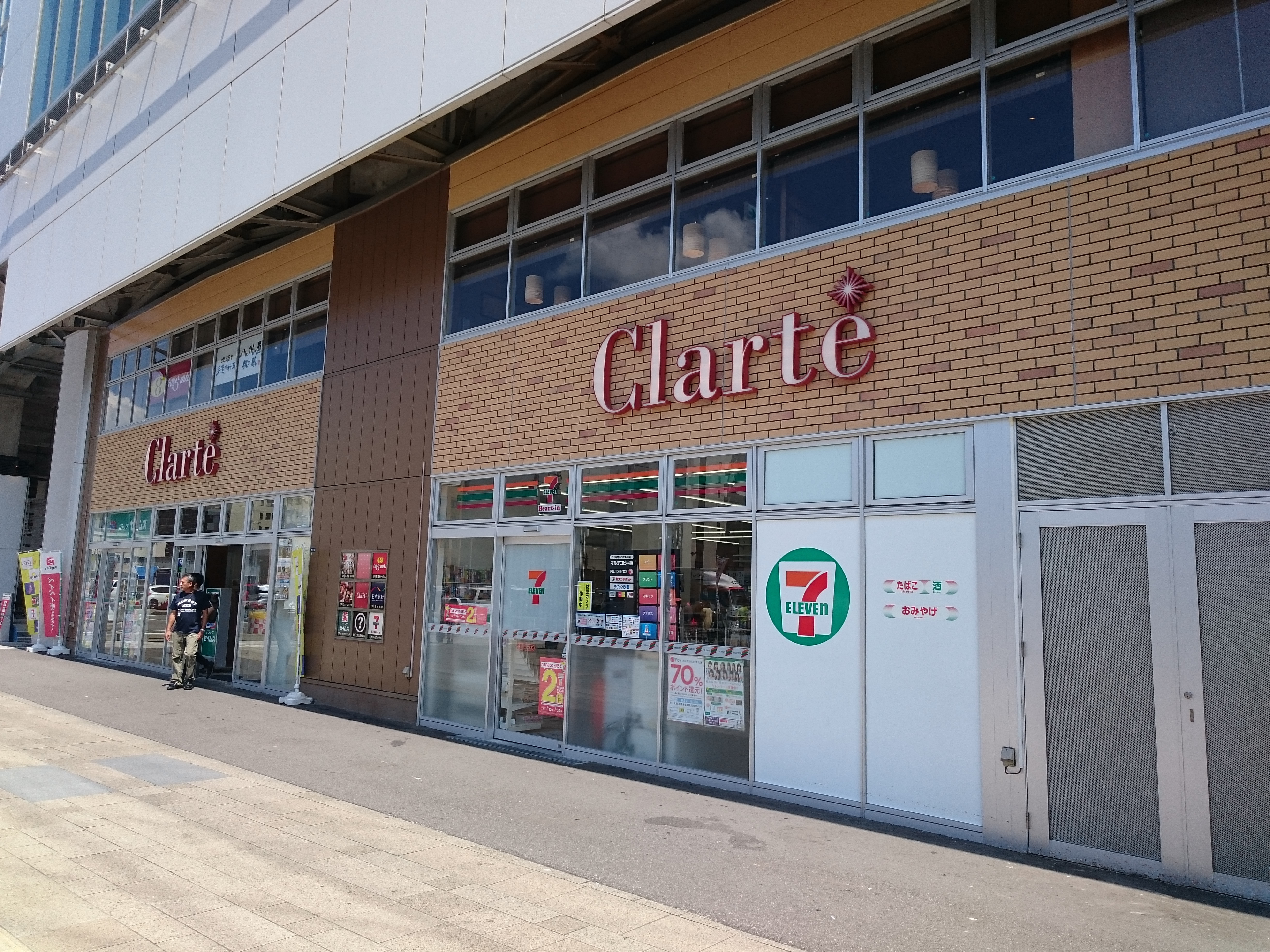 Clarte 富山の外観 Sony Xperia Z3